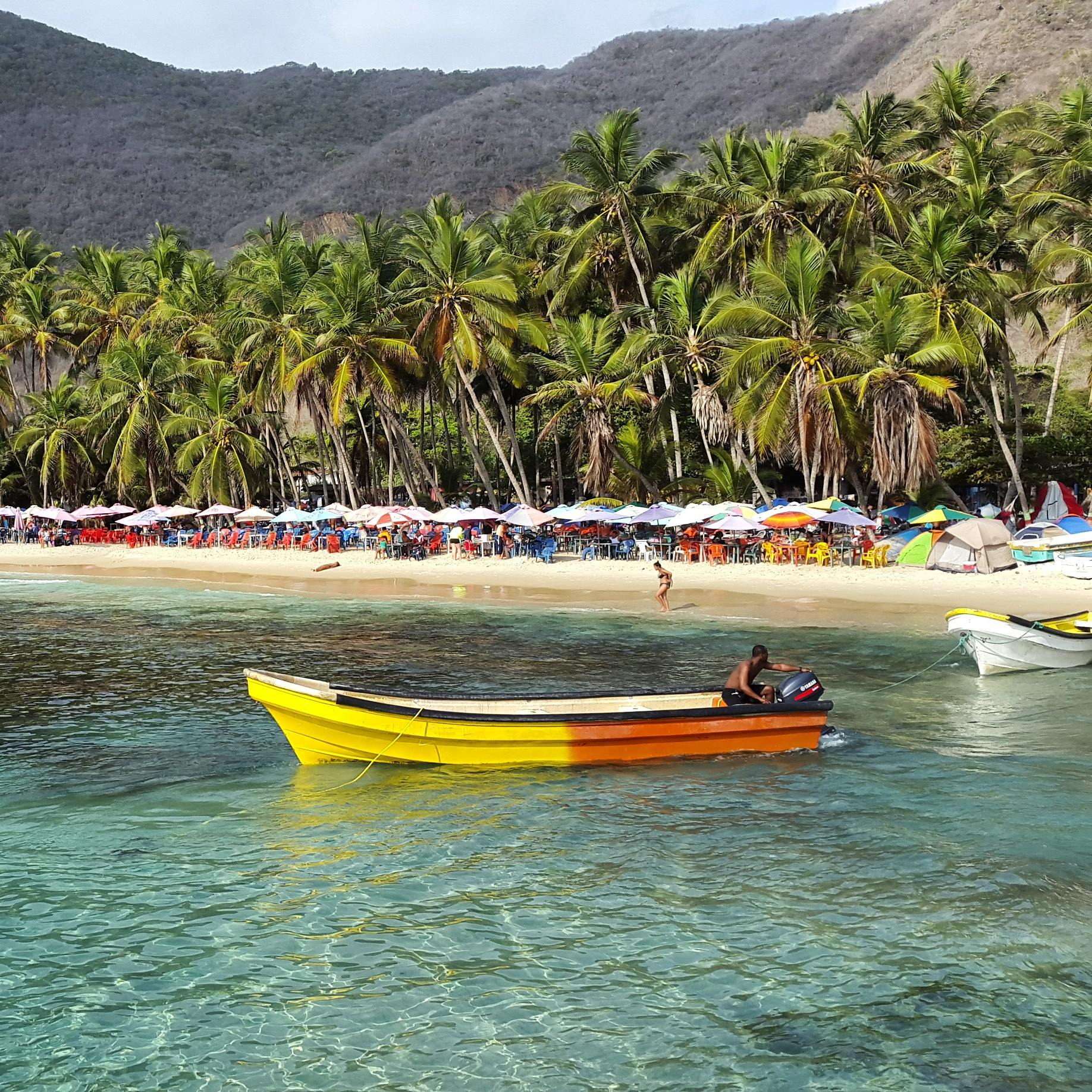 Lancheron de la bahia su principal trabajo es la pesca y en temporadas realizan viajes llevando turistas a catica y la cienaga